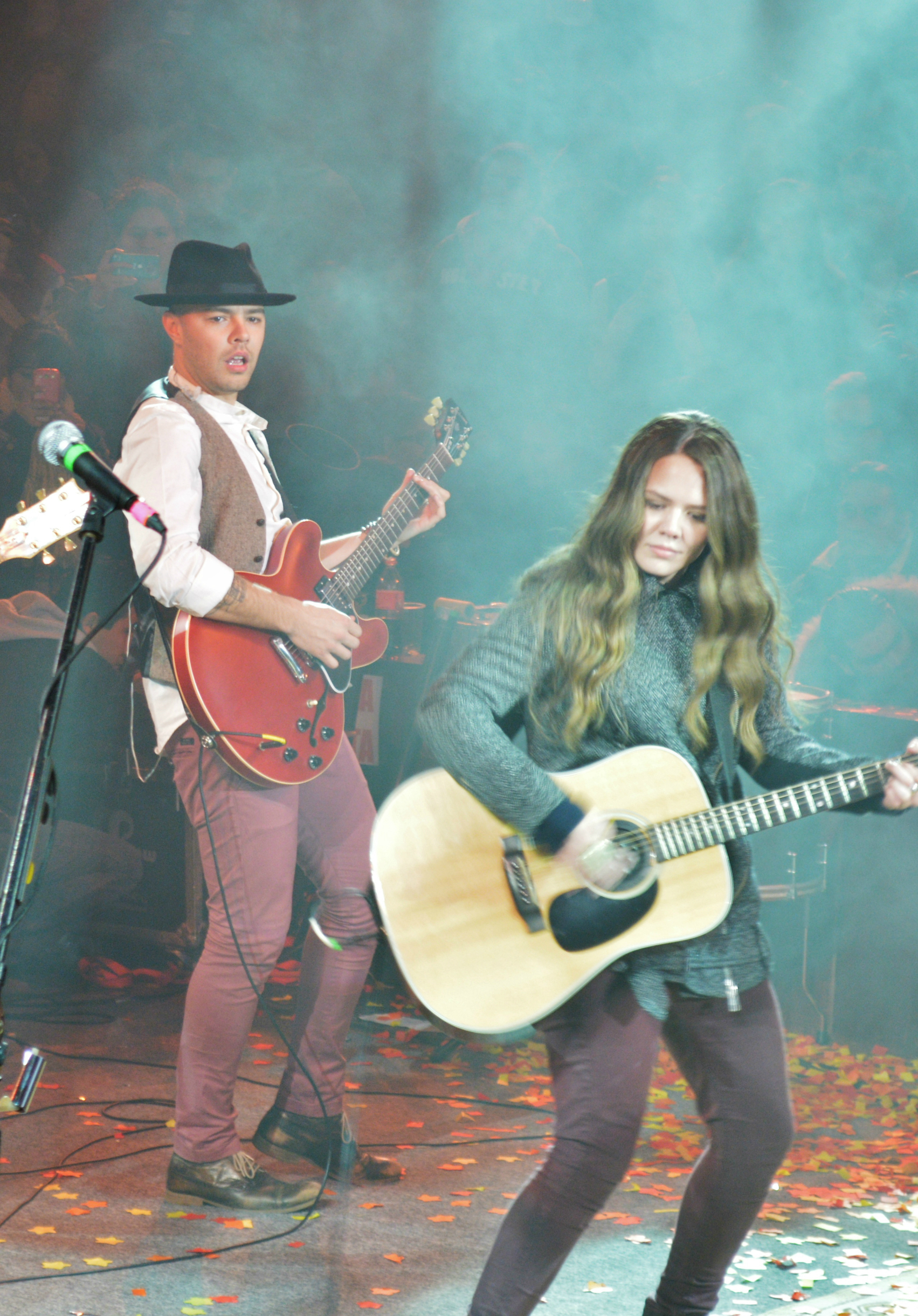 Jesse & Joy durante el palenque la Feria Ganadera de Querétaro, como parte de ¿Con quién se queda el perro? Tour, en Santiago de Querétaro, México. Domingo 1 de diciembre de 2013